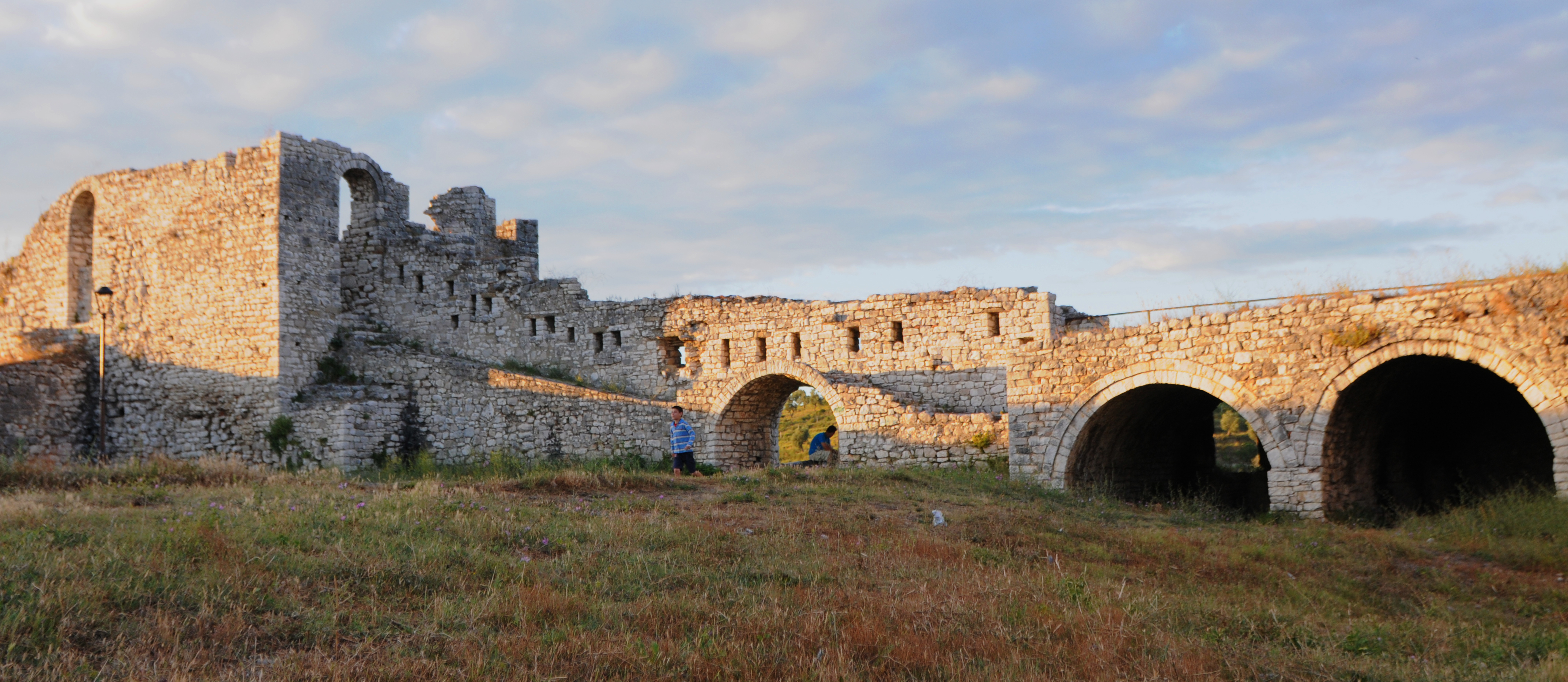 Historická pevnost v Beratu, Albánie